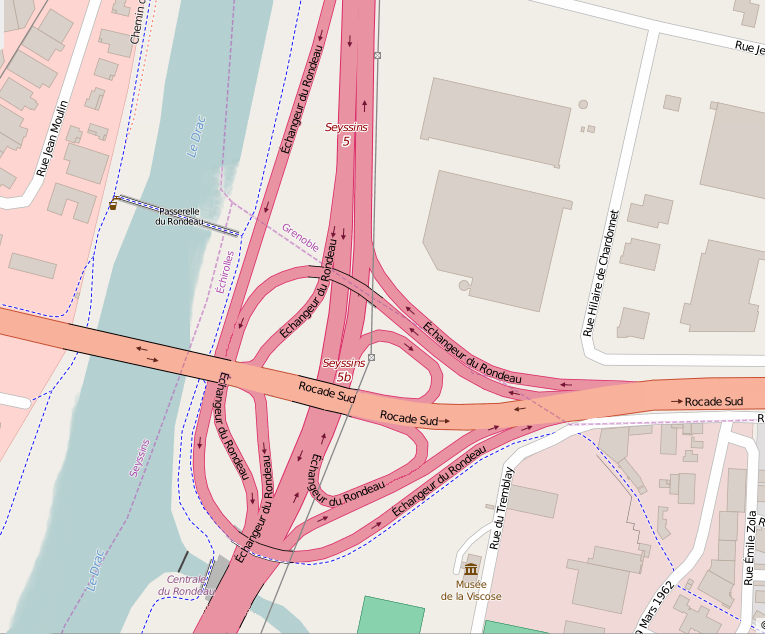 Plan de l'échangeur du Rondeau à Grenoble en 2015. Fond de la carte : Open Street Maps.